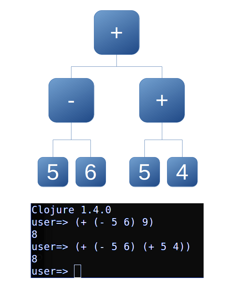 درخت نحوی ساده شده برای یک عملیات جبری از نوع لهستانی یا پیشوندی در کنار نحو زبان کلوژر که مشابه با آن است